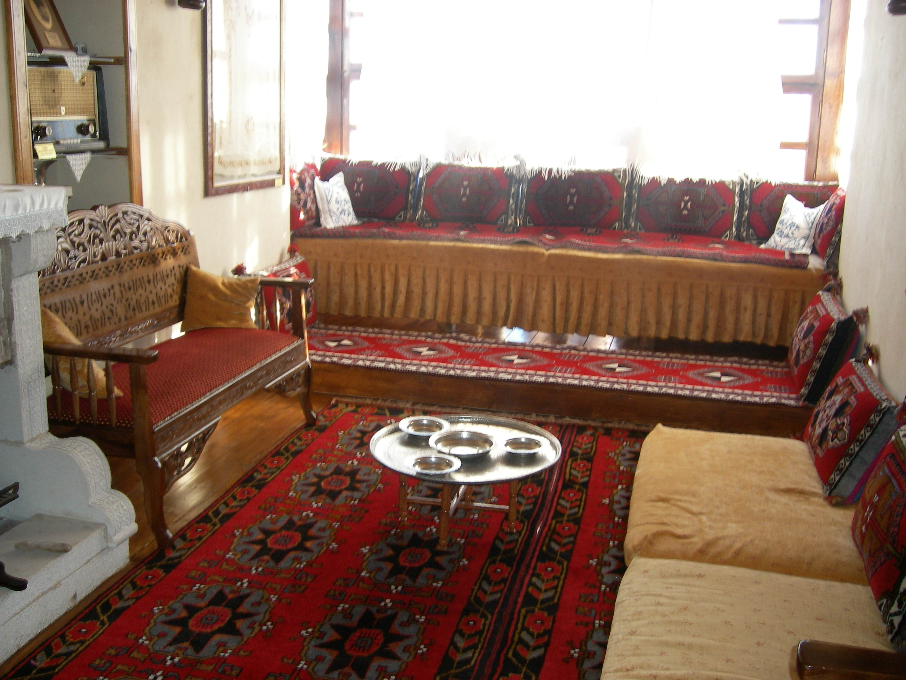 Elazığ'da Müze Ev